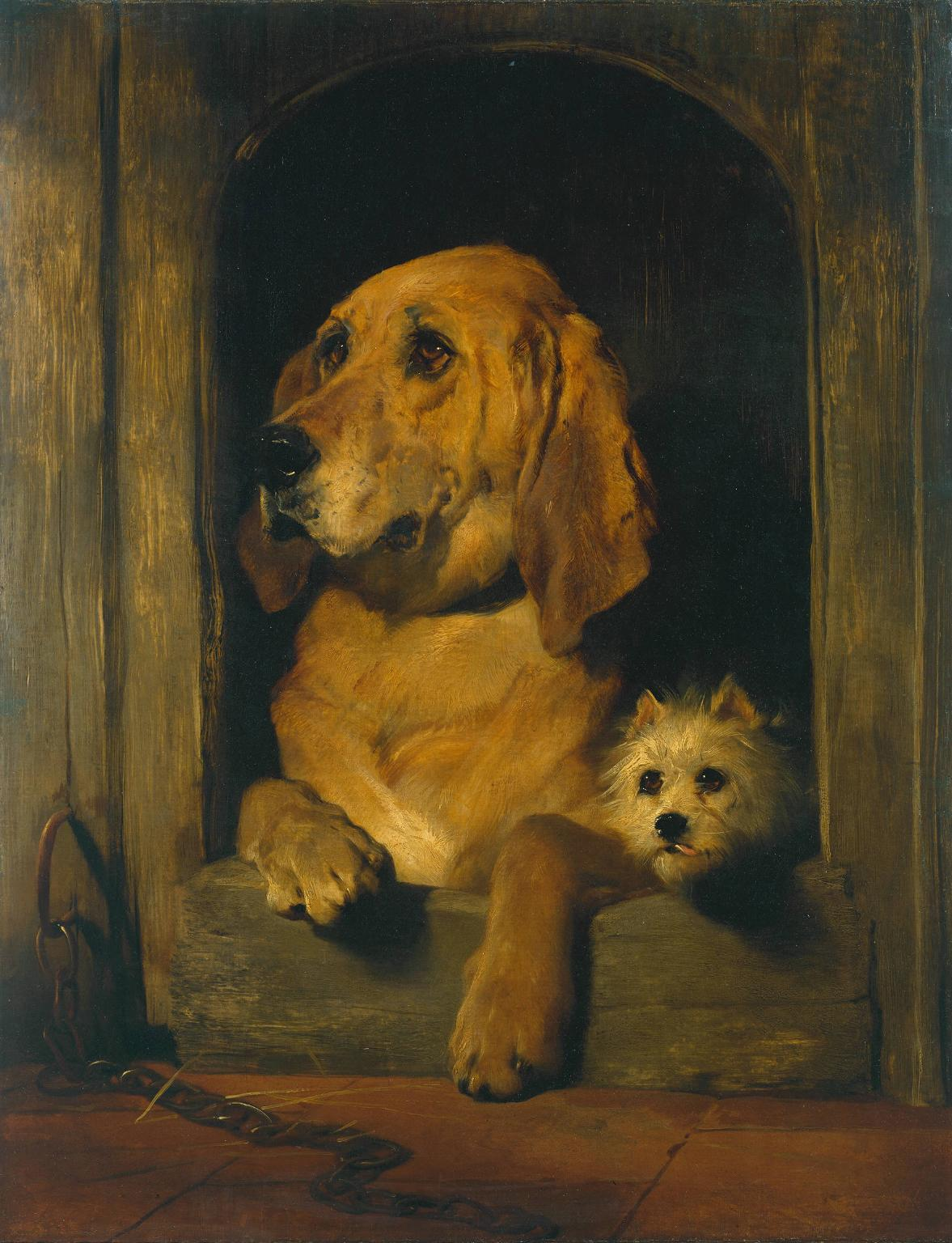 Edwin Henry Landseer (1802-1873): Dignity and Impudence. Öl auf Leinwand, 1155 x 952 x 108 mm. Tate Gallery, London